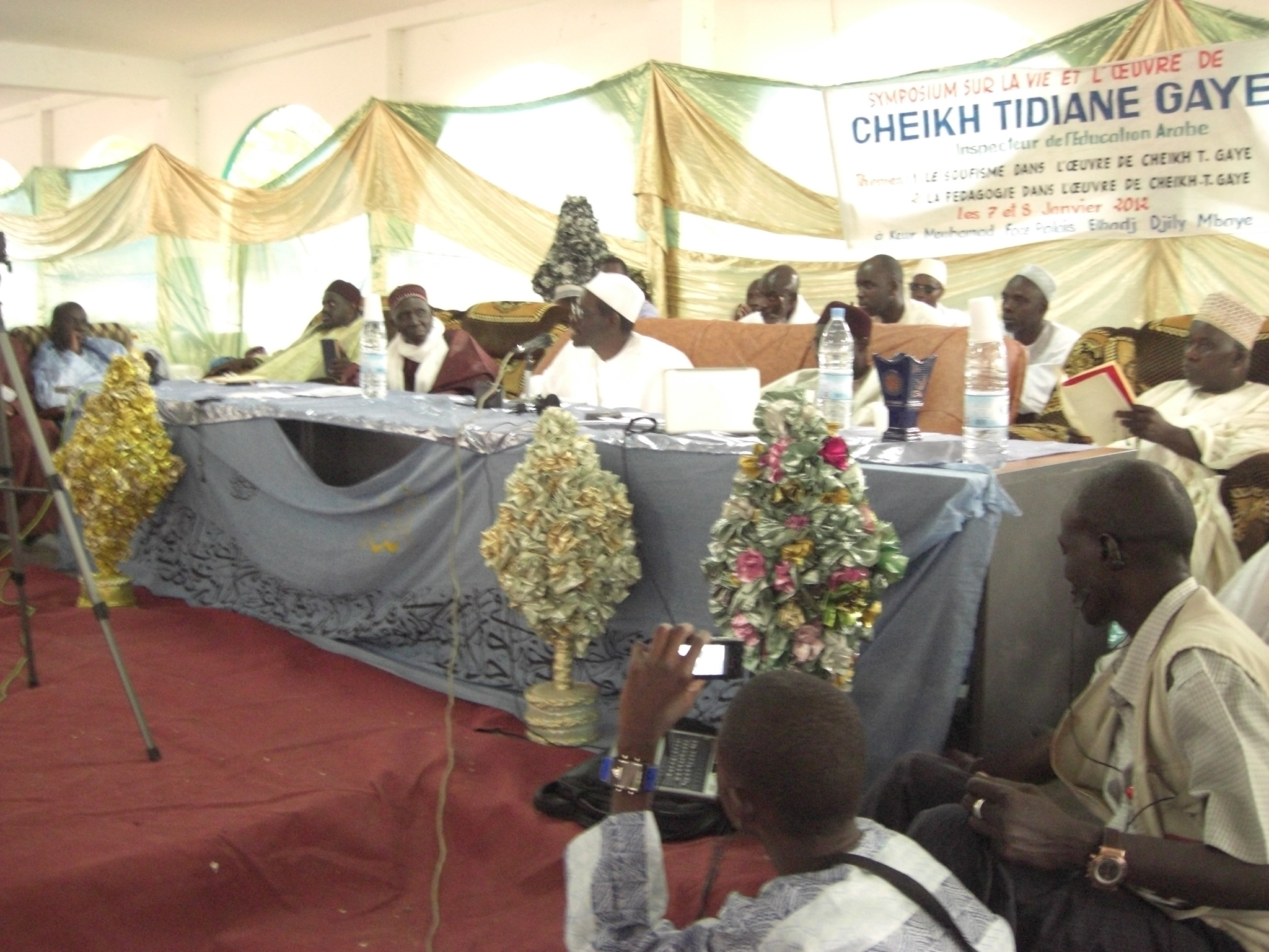 Le présidium du samedi lors du symposium sur la vie et l’œuvre de Cheikh Tidiane Gaye à Louga